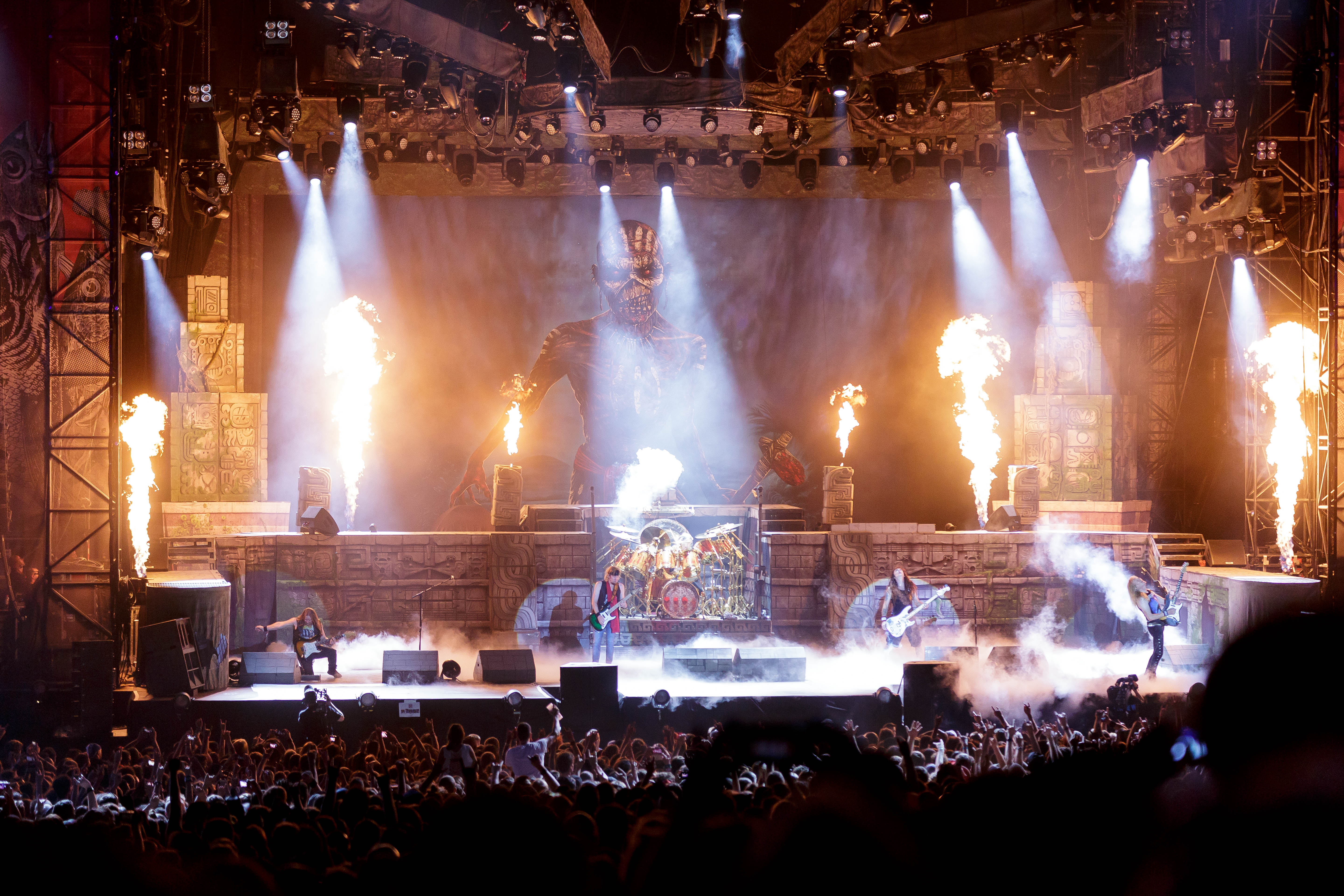 Paléo Festival Nyon, édition 2016, 19-24 juillet 2016. Mercredi 20: Iron Maiden (heavy-metal, Grande-Bretagne)